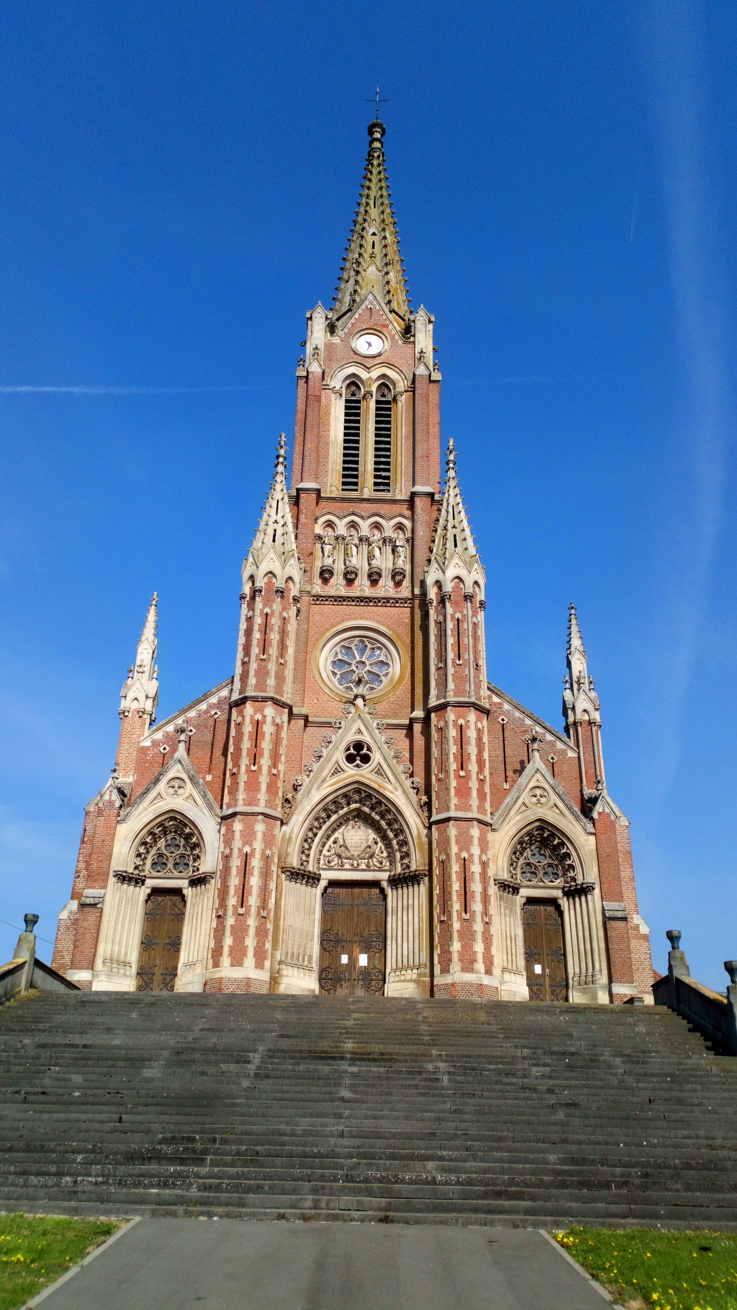 Église Saint-Nicolas de Beauval (Somme) 2